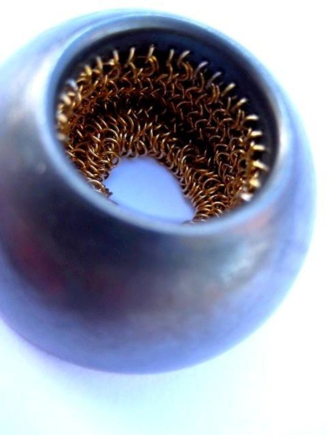 Anne Baezner (Collection du Musée d'art et d'histoire, Genève)